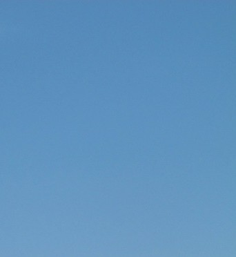 Голубое небо